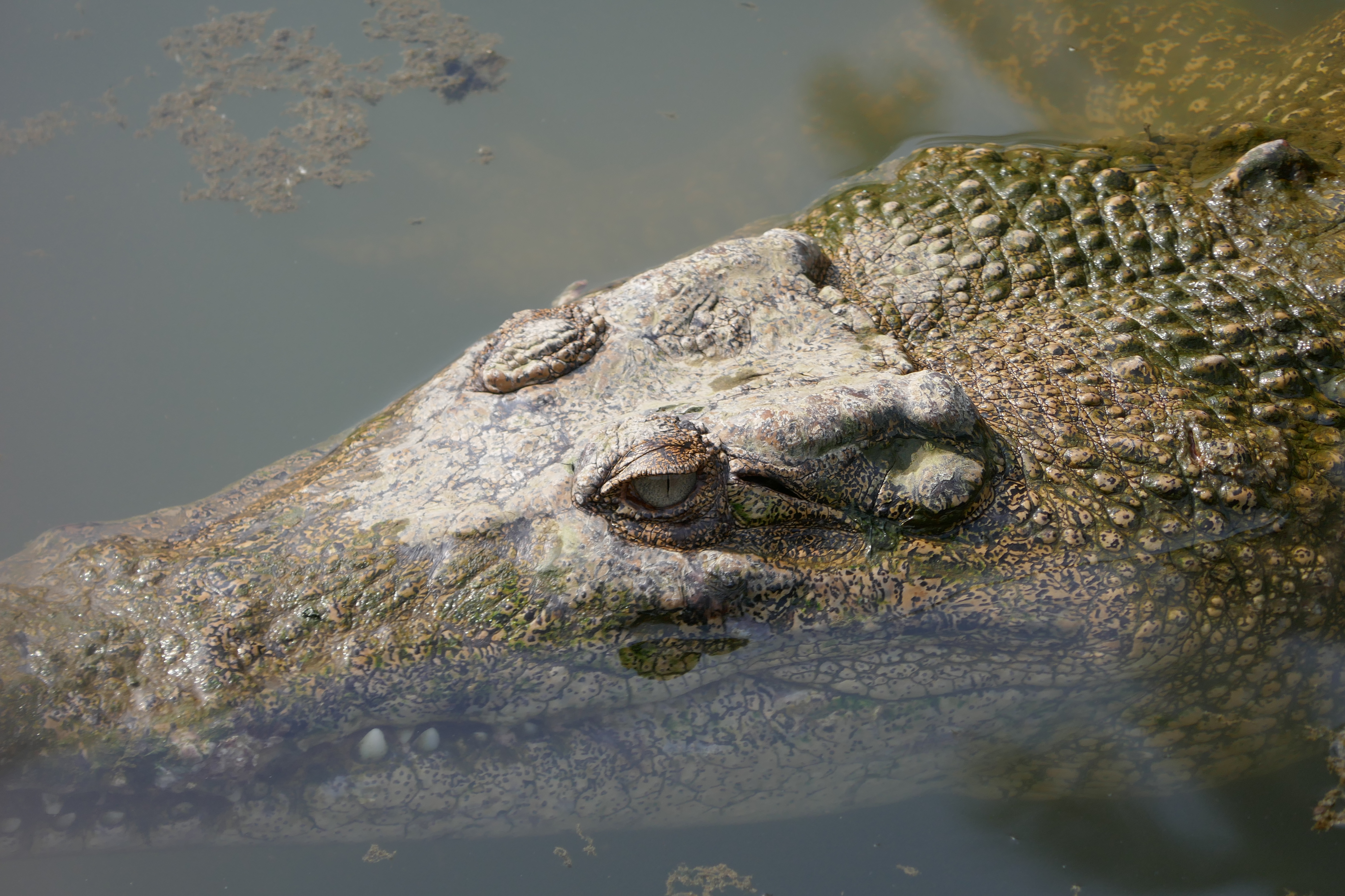 Crocodile Eye